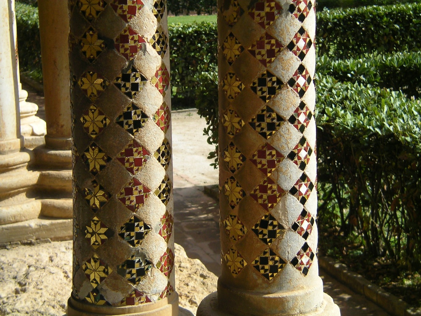 Kreuzgang von Monreale, Detail zweier Säulen Chiostro di Monreale, dettaglio di due colonne. English. Cathedral of Monreale, cloister, detail of column, ca. 1200 CE